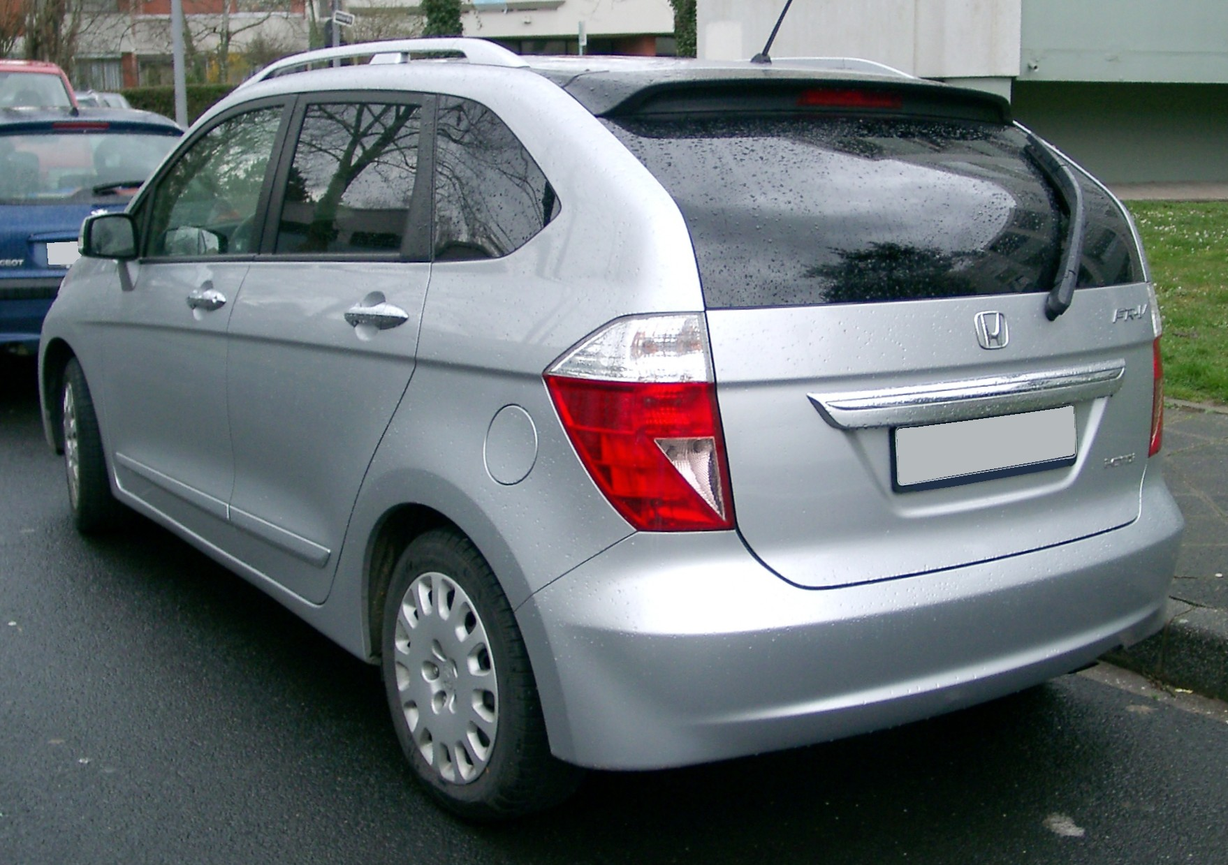 Honda FR-V